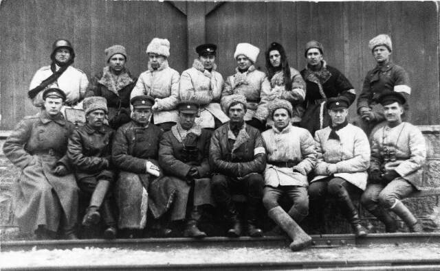 LRSR nr 2 ohvitserid koos Soomusrongide Divisjoni ülema kapten Anton Irvega Vastseliina raudteejaamas. Esimene rida (vasakult): LRSR nr 2 suurtükipatarei ülem lipnik Leonhard Pallon (teine), Soomusrongide Divisjoni suurtükiväe inspektor leitnant Reinhold Sabolotnõi (kolmas, parem käsi kinni seotud), Soomusrongide Divisjoni ülem kapten Anton Irv (neljas), LRSR nr 2 ülem kapten Jaan Lepp (viies). Teises reas (vasakult esimene): Soomusrongide Divisjoni operatiivadjutant alamkapten Arnold Hinnom (12. märts 1919).